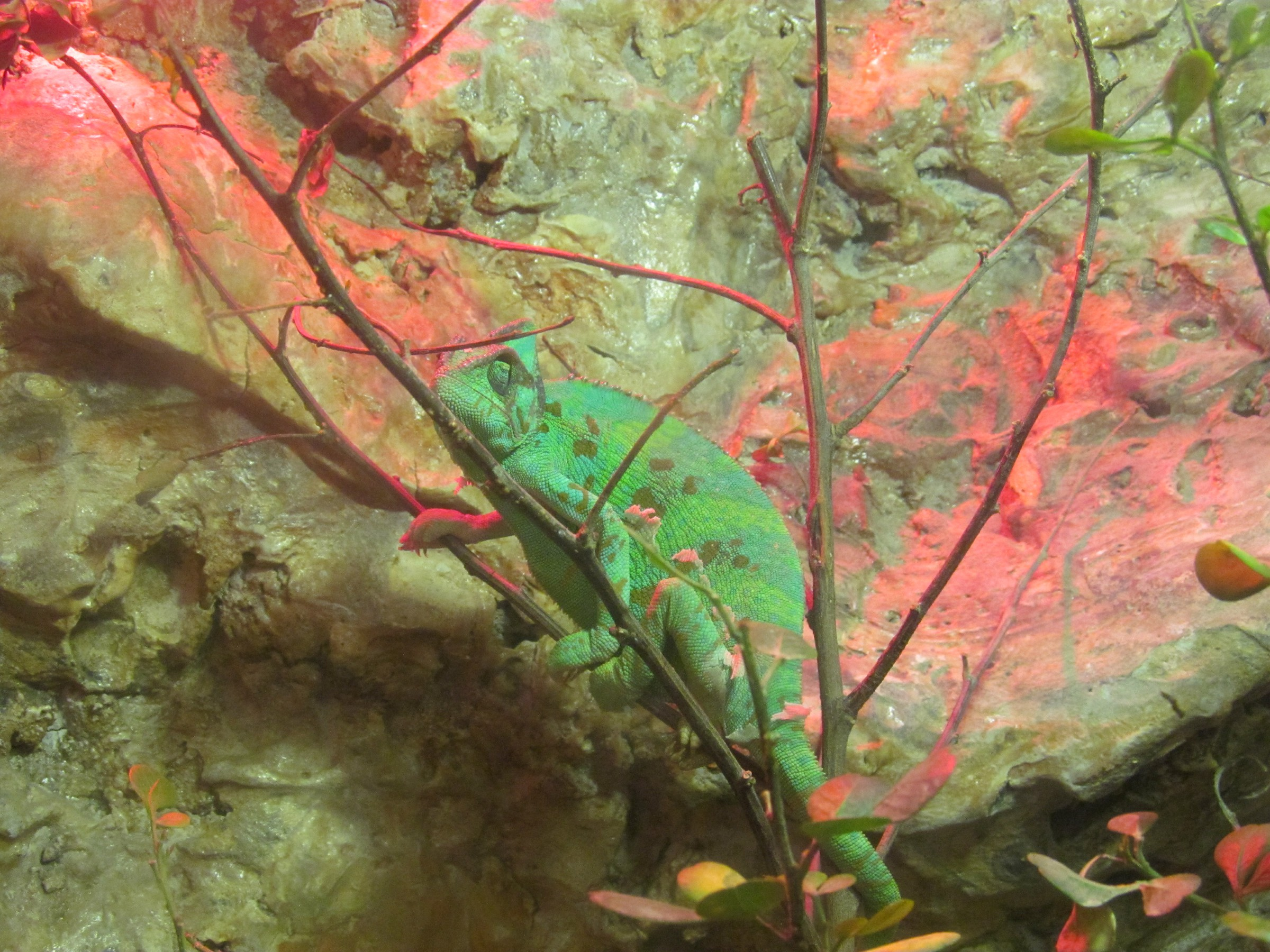 זיקית תימנית בגן החיות התנכי בירושלים